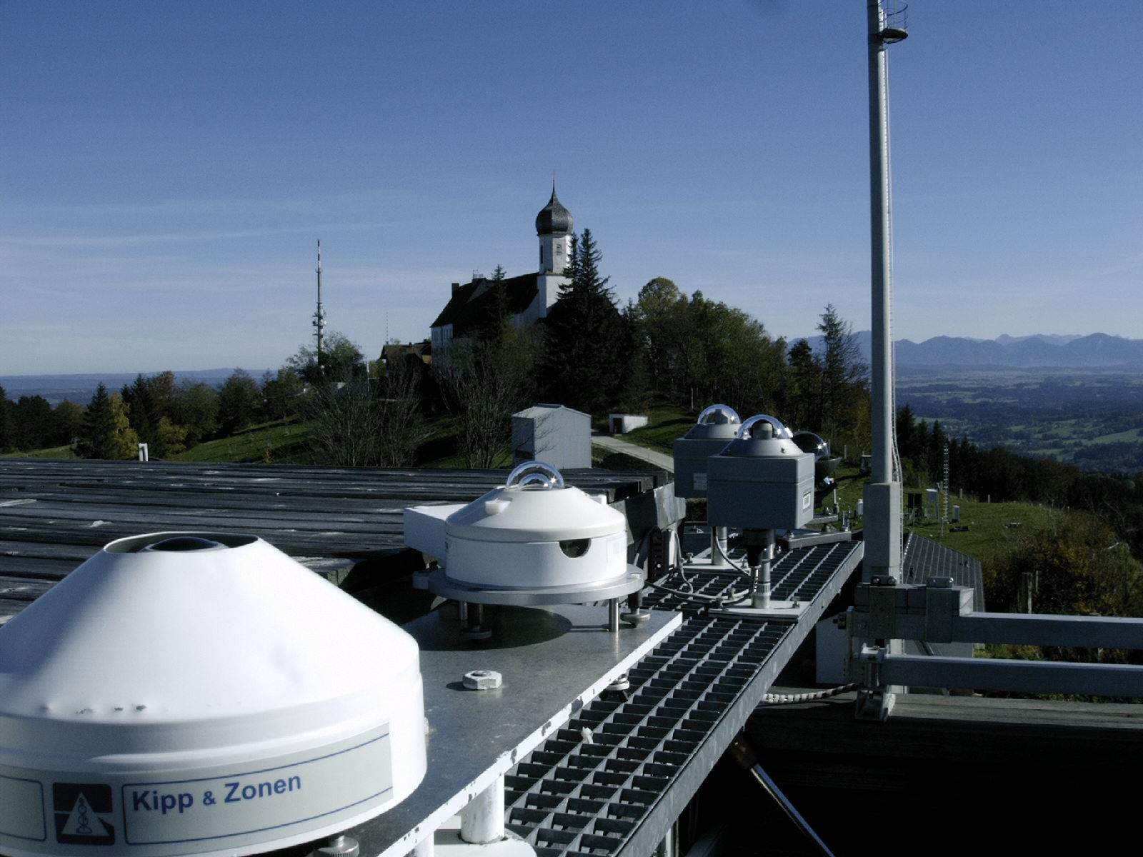 Hohenpeißenberg Messungen